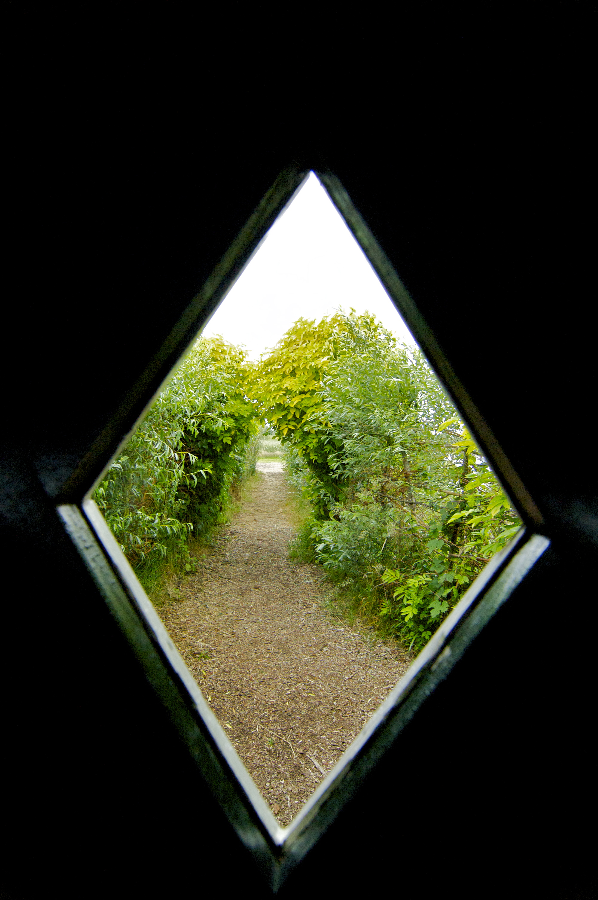 Uitkijkje This is a photo or sound file made in De Alde Feanen National Park in the Netherlands, with the main subject of the file in the category: landscapes